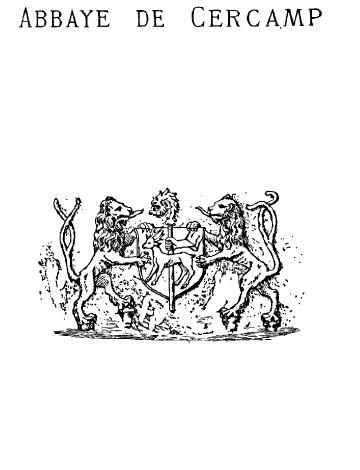 Abbaye de Cercamps - Fronton - Armoirie - 1878